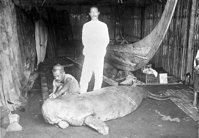 Repronegatief. Twee mannen bij een zeekoe (doejong) op het droge